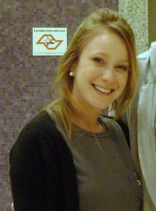 Caroline Abras, atriz brasileira, após a apresentação da peça "Babel", em São Paulo.